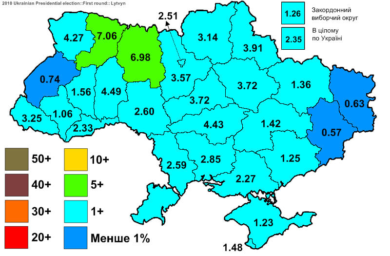 Електоральна підтримка Литвина Володимира Михайловича на виборах Президента України 2010. Перший тур.